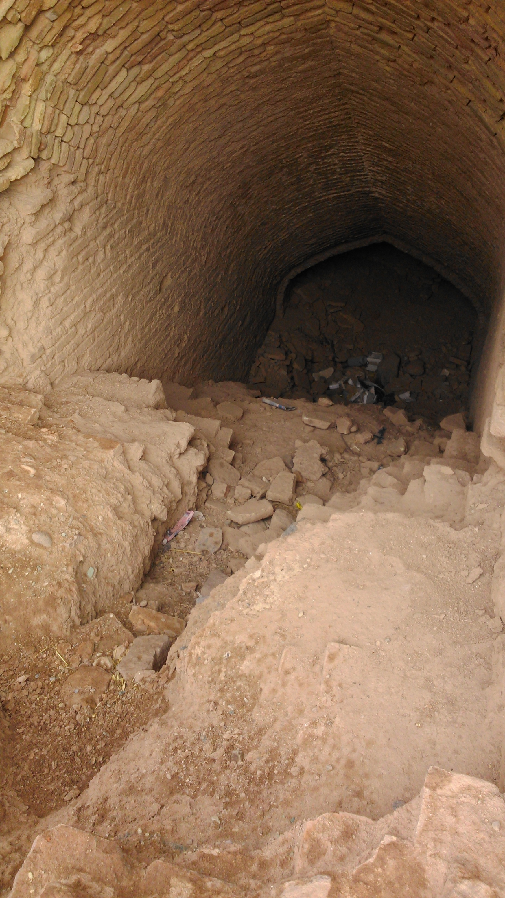 آب‌انبار در حال تخریب کاروانسرای شاه عباسی در ایوانکی